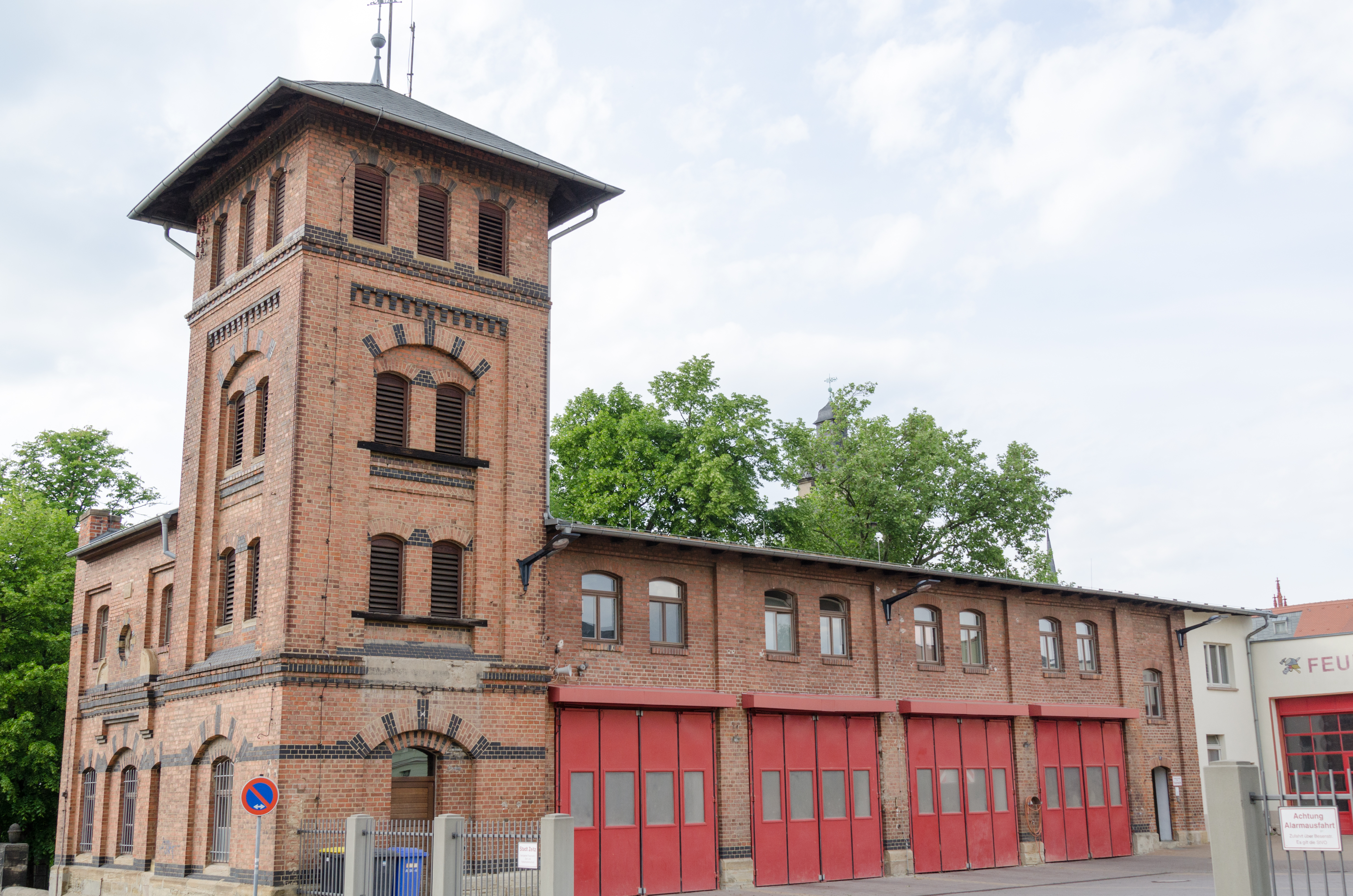 Zeitz, Steinsgraben 27